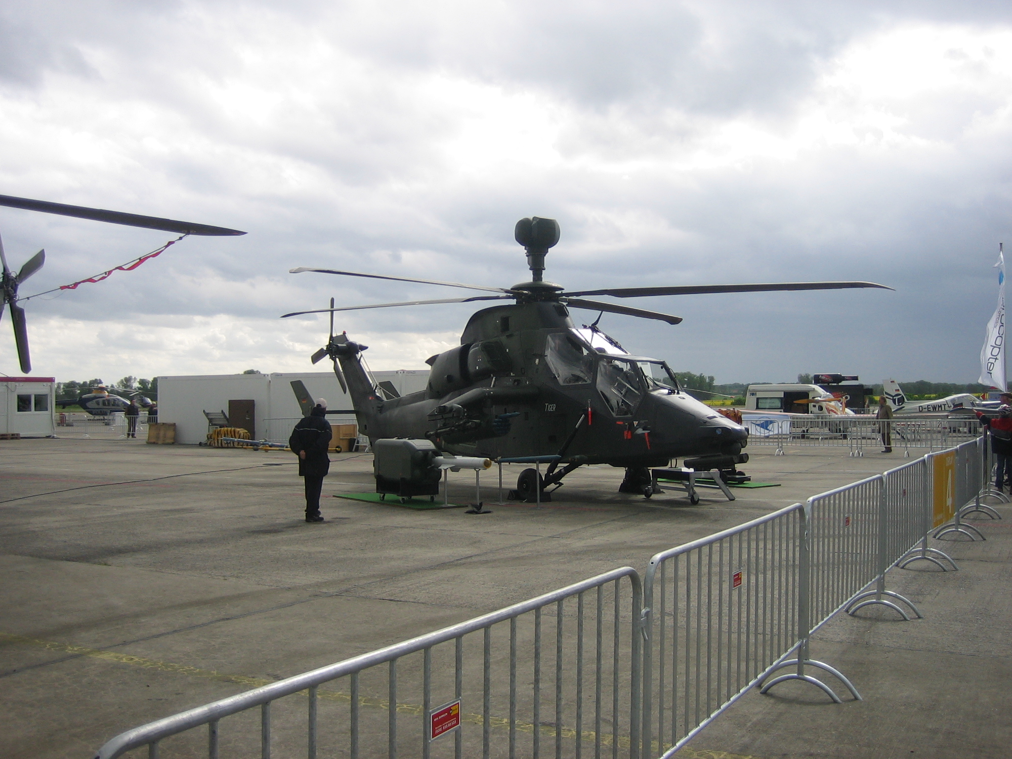 Kampfhubschrauber Eurocopter Tiger.